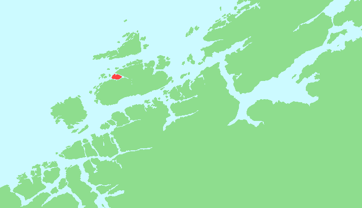 Locator map of Helgebustad, Sør-Trøndelag, Norway